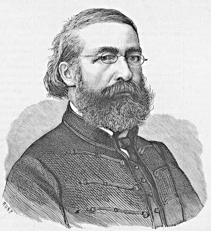 Tóth Ágoston Rafael (1812–1889) honvéd ezredes, hadmérnök, térképész. Rusz Károly metszete (Vasárnapi Ujság, 1869, május 30.)